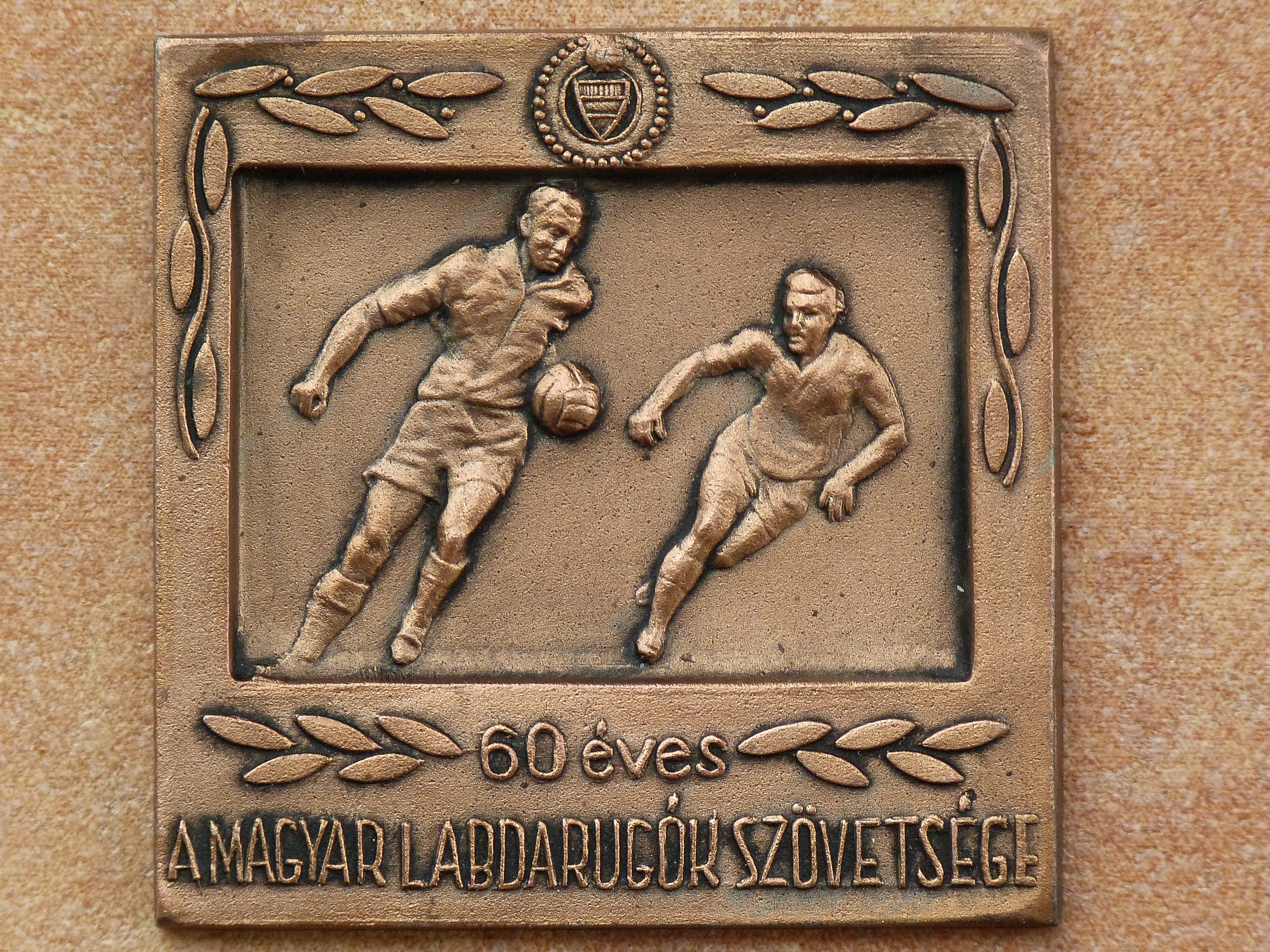 A felvétel 2013. Március hó 10 –én készült. 60 éves a Magyar Labdarúgó Szövetség A Magyar Népköztársaság Labdarúgó Nemzeti Bajnoksága NB/I 1960 – 1961. Emlékérem mérete: 5 cm x 5 cm. ©© Köztulajdon, Derzsi Elekes Andor, Budapest, 2012, . A kép és filmfelvételek egészben, vagy részletekben másolását, bármilyen úton történő sokszorosítását és felhasználását a szerző ellenérték nélkül, jogutódjaira is kihatóan megengedi. Az engedély kiterjed a kereskedelmi célú hasznosításra is. Kéri azonban nevének feltüntetését a felhasználás során. A Metapolisz sorozat valamennyi képe és filmje Creative Commons alatti valamint kereskedelmi - for profit - célra is felhasználható. Ajánlott hivatkozás: Derzsi Elekes Andor: Metapolisz DVD line